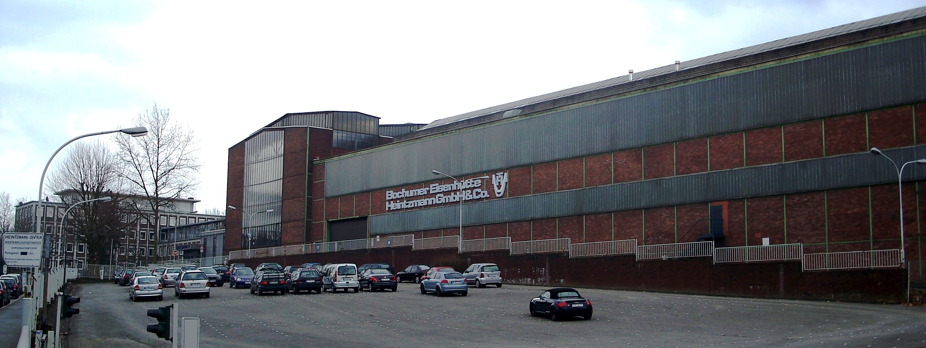 Gebäude der Bochumer Eisenhütte Heintzmann an der Bessemerstraße in Bochum